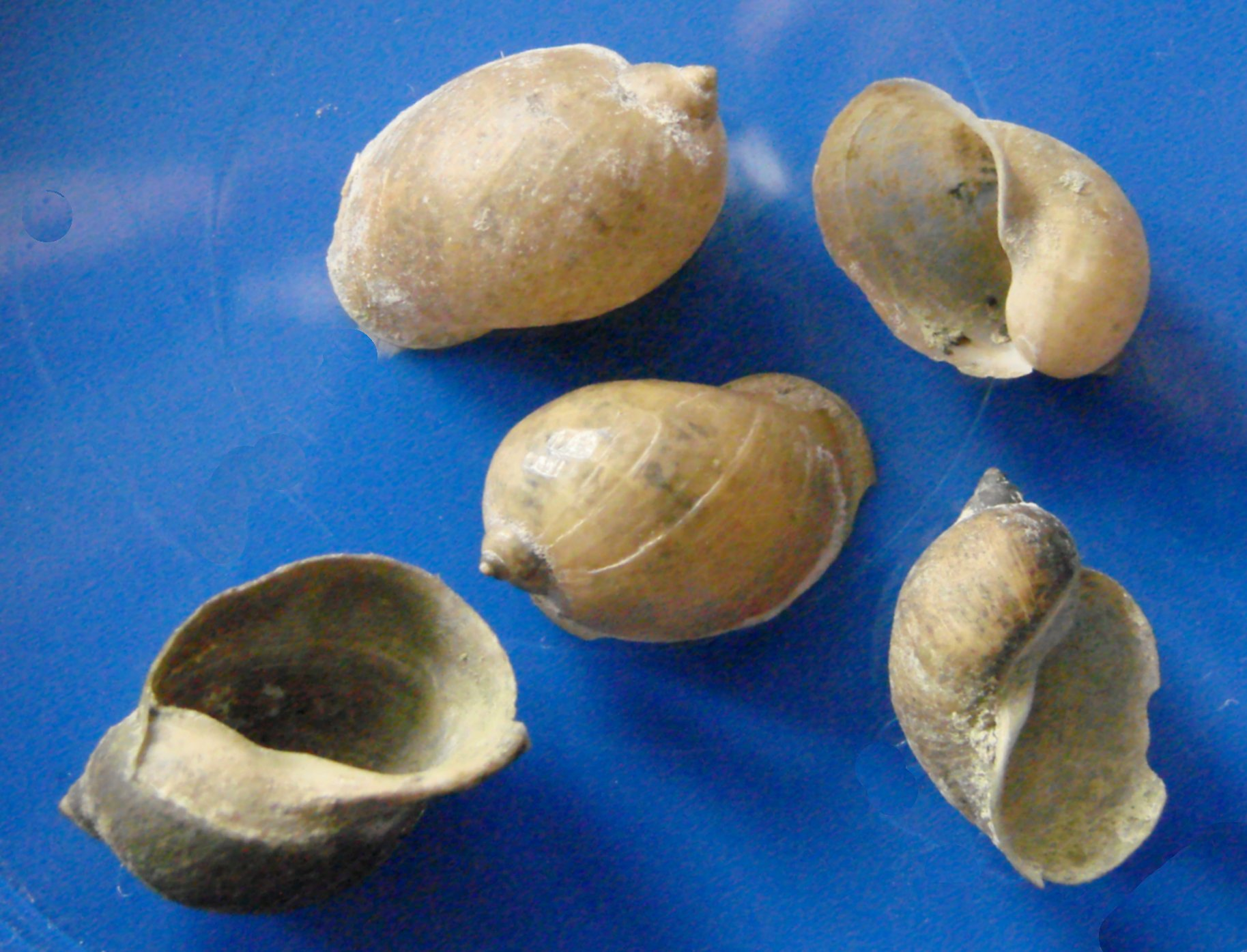 Limnaea peregra var. ovata